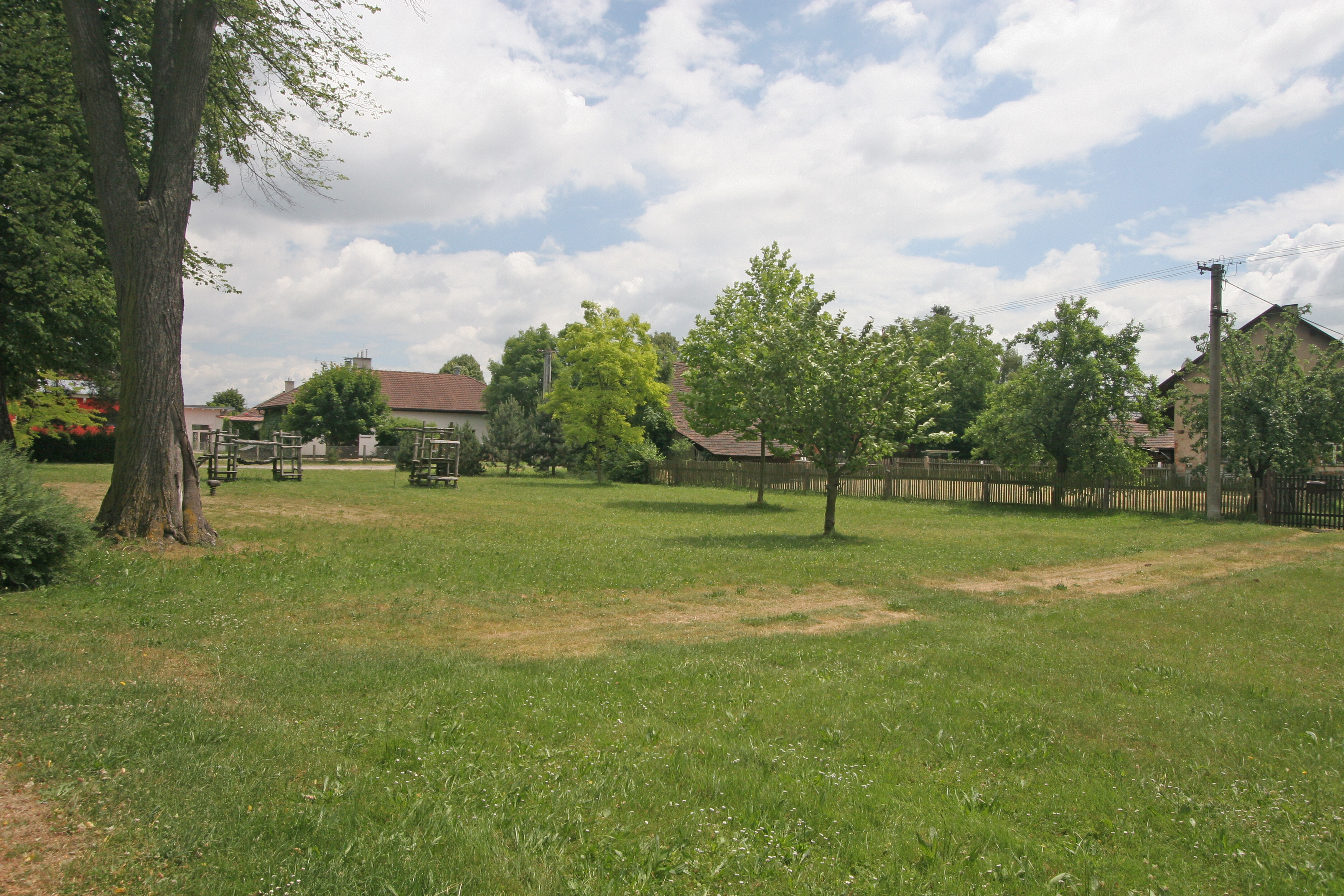 Rokytno náves